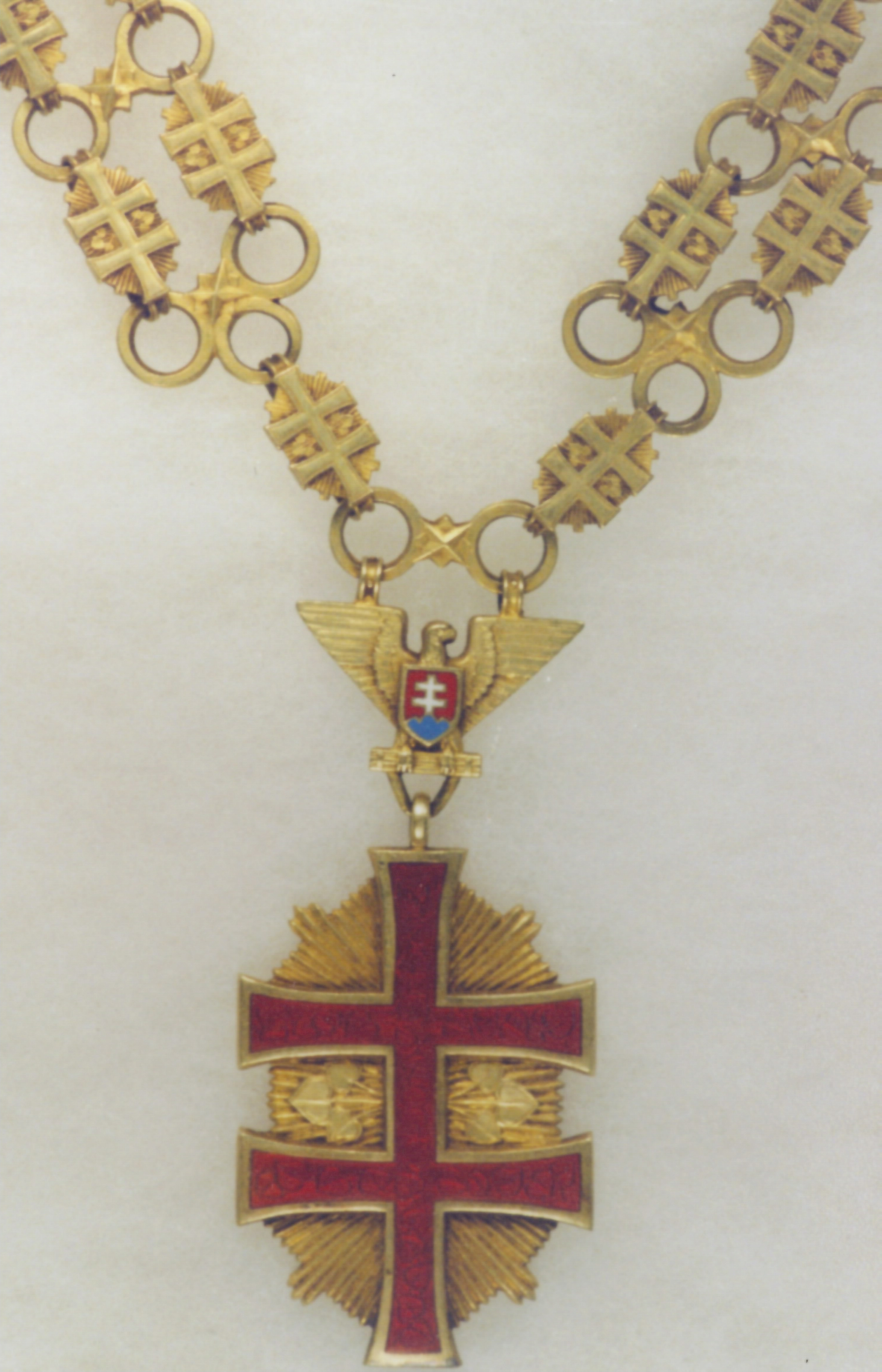 Veľkokríž vojenného víťazného kríža s dvojradovou reťazou, vyobrazenie bez hviezdy z roku 1942